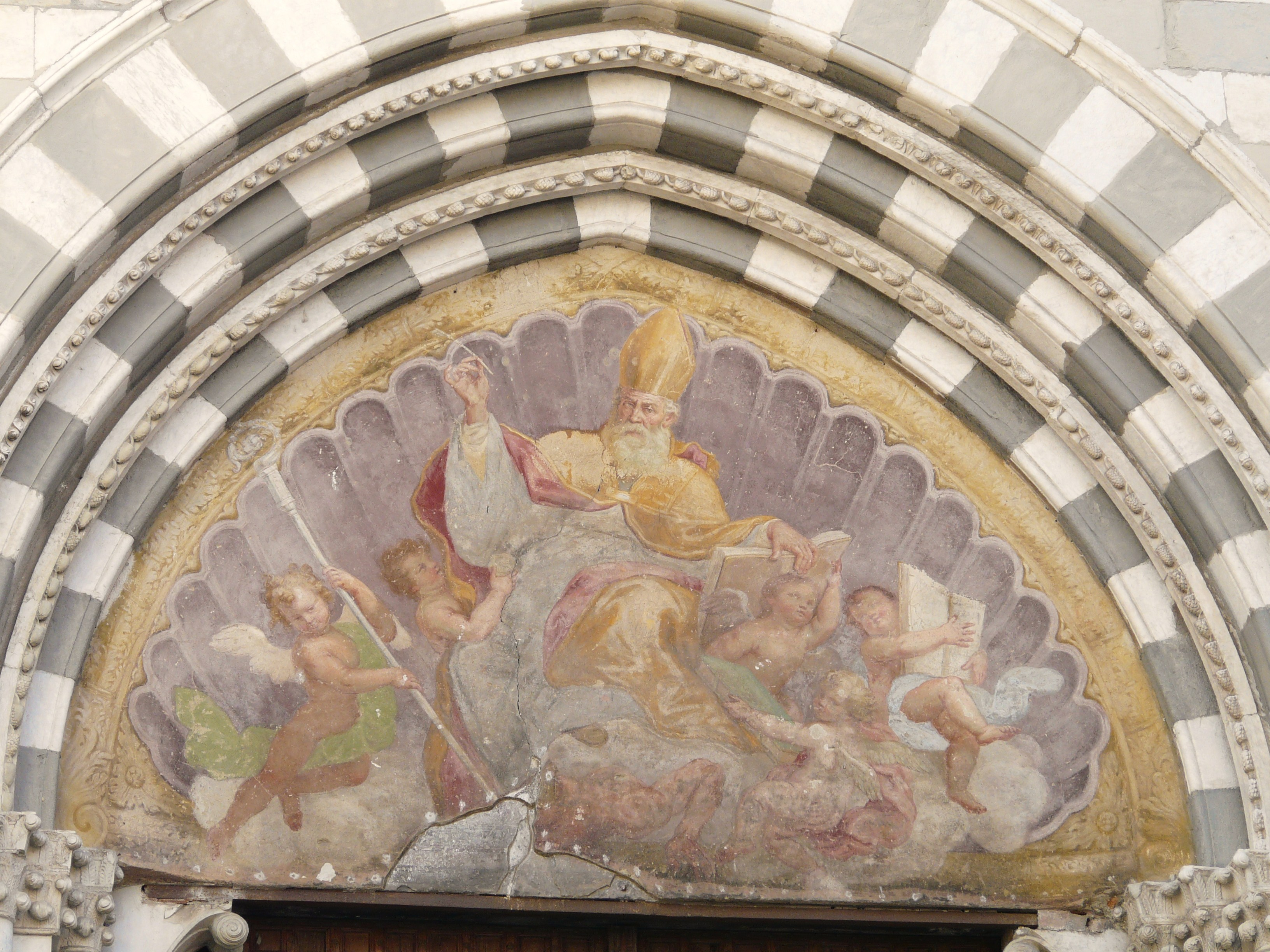 Ex chiesa di Sant'Agostino, Genova, Liguria, Italia